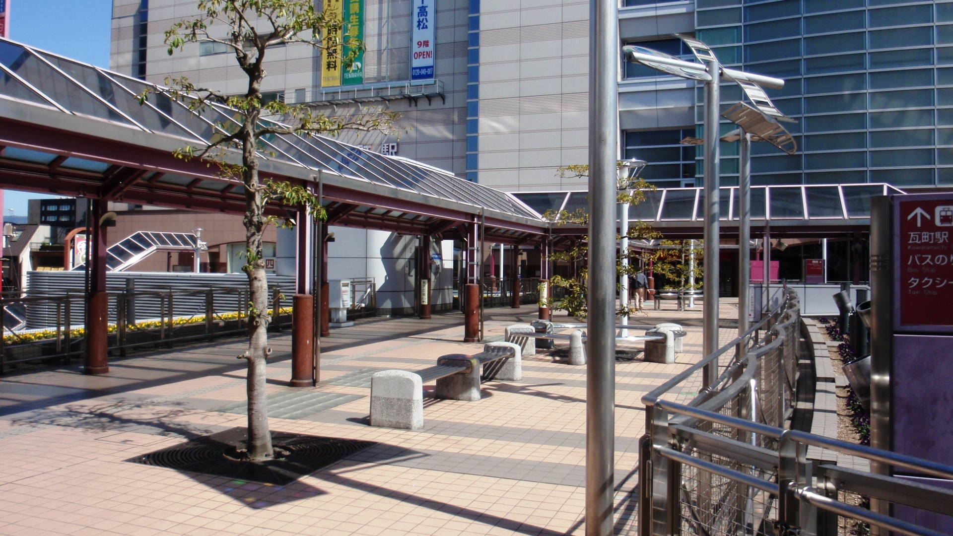 香川県高松市のことでん瓦町駅前のペデストリアンデッキ上部。